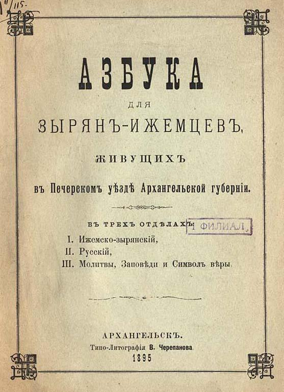 Komi azbuka (1895)